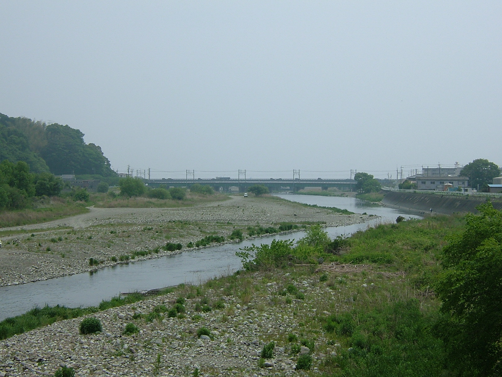 興津川を興津大橋上から河口方面を望む